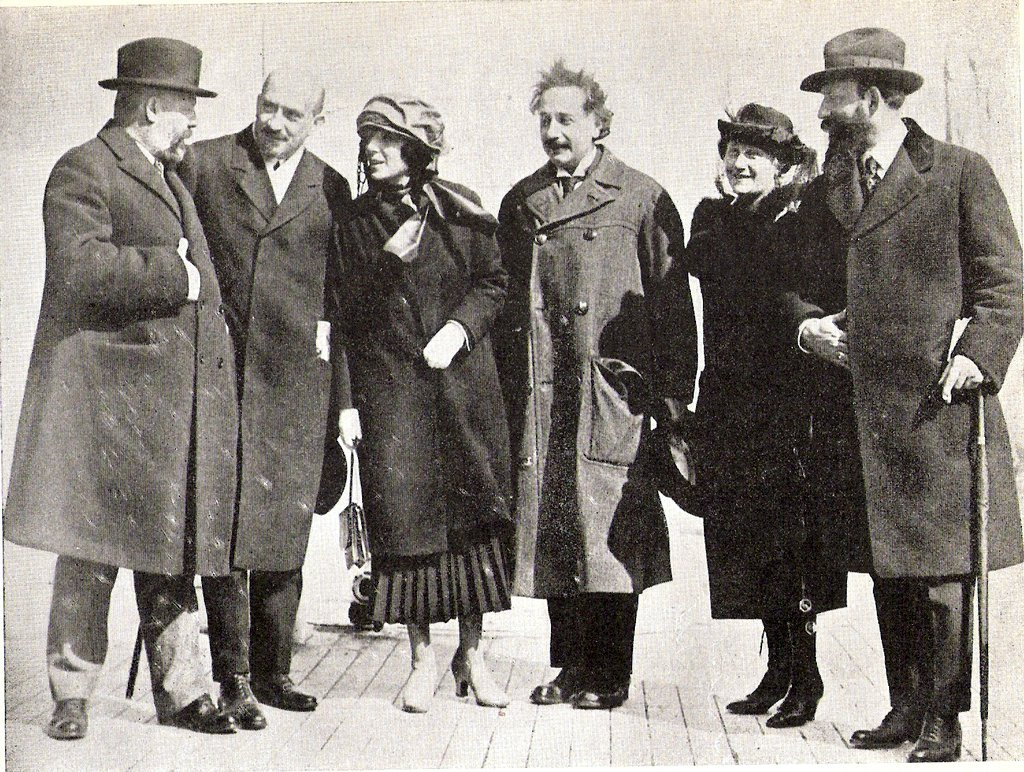 אפריל 1921, חיים ויצמן מבקר בארצות הברית בראש משלחת ציונית. בתמונה משמאל לימין: מנחם אוסישקין, חיים ויצמן, ורה ויצמן, פרופ' אלברט איינשטיין, אלזה איינשטיין, ד"ר בן-ציון מוסינזון